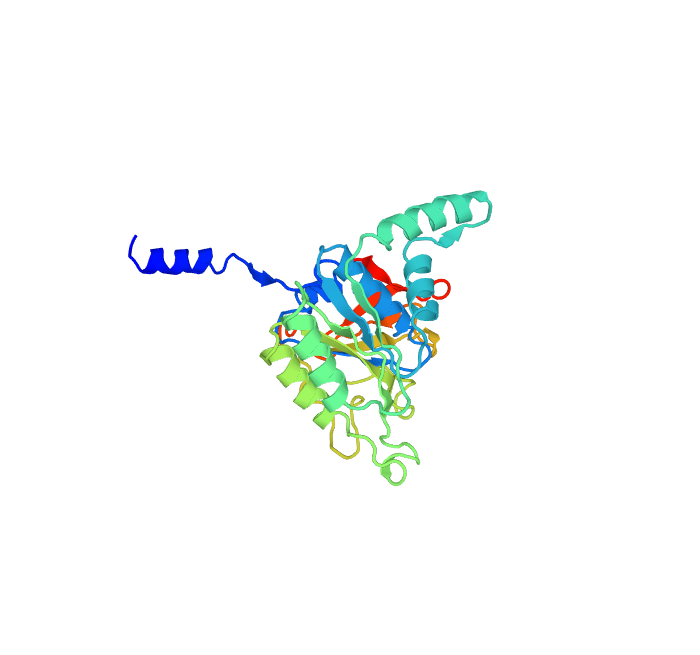 Model tridimensional